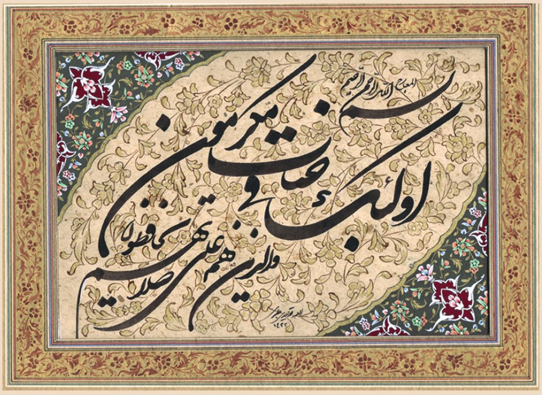 peinture moderne